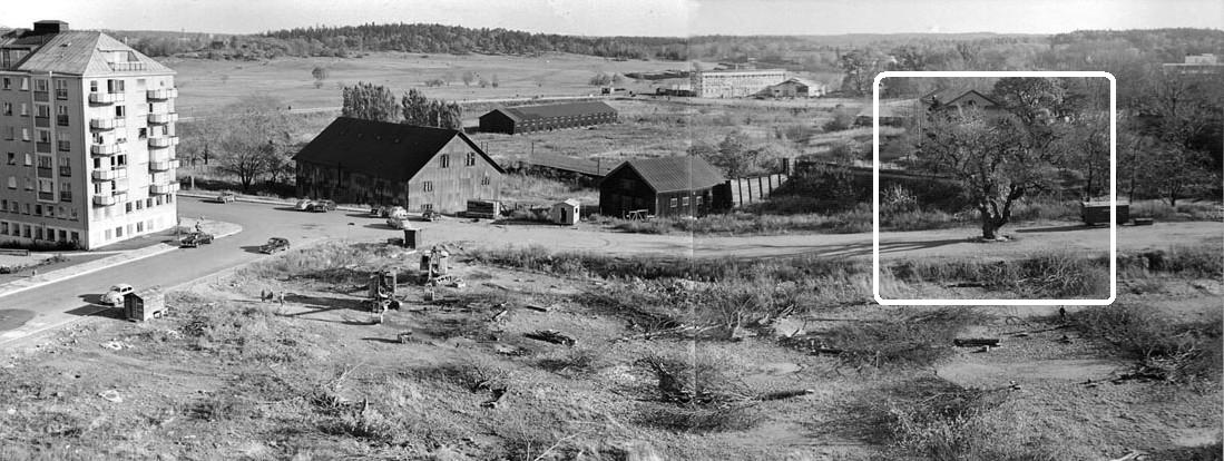 TV-eken (längs till höger)